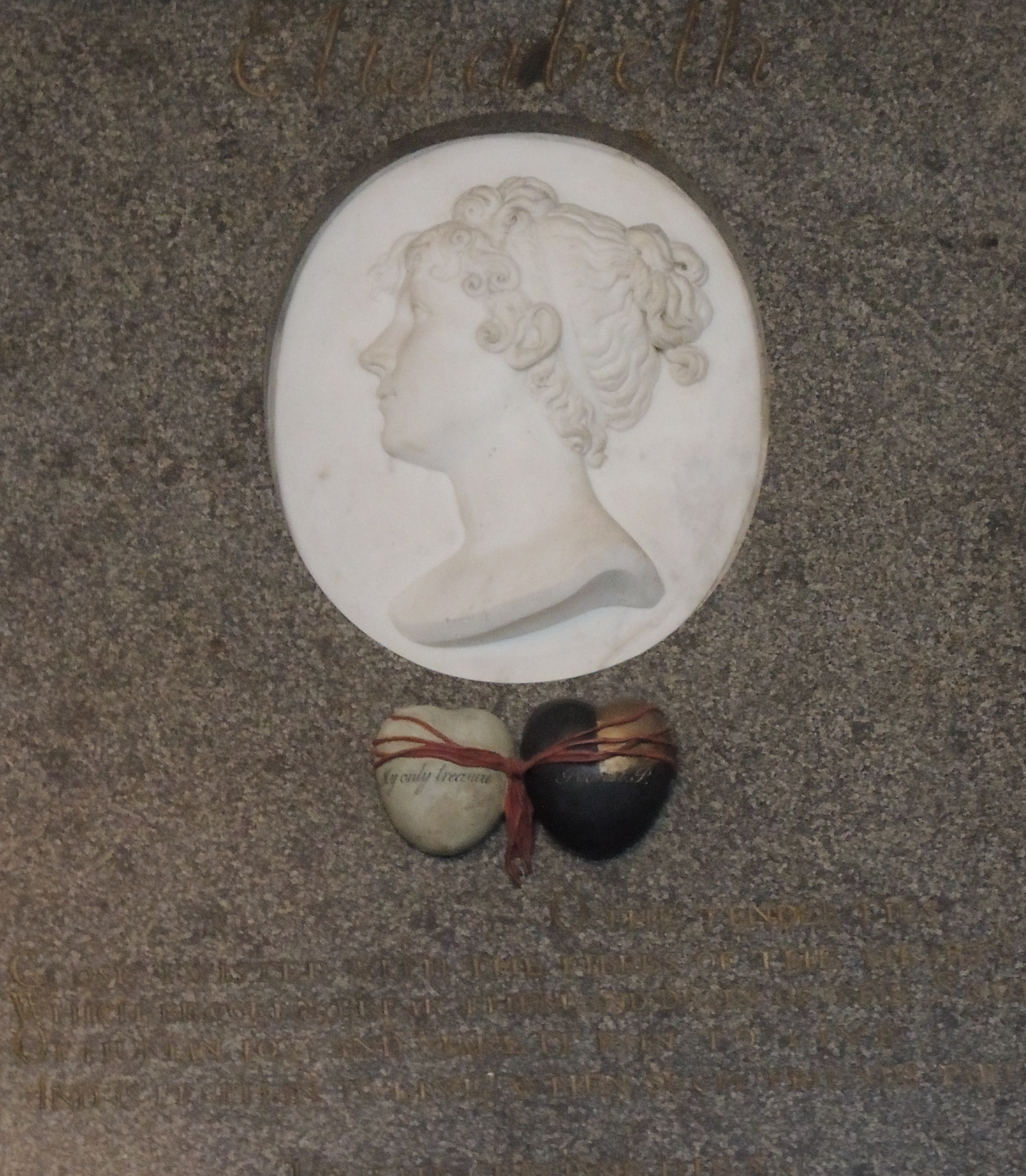 Чичагова (урожд. Проби Элизабет) Елизавета Карловна ск. 1811 Дочь капитана Чарлза Проби, начальника Чэтемского порта. Жена адмирала Павла Васильевича Чичагова (1767-1849). Дети: Аделаида (Адель) (род. 24.09.1800); Юлия (род. 1802); Екатерина (род. 1806). Россия. Санкт-Петербург. Благовещенская усыпальница. Александро-Невская лавра. Скульптурный памятник. Мрамор, гранит, бронза. Скульптор И.П. Мартос (1754-1835), 1812 г. Скульптура перенесена из мавзолея Е.К. Чичаговой на Смоленском лютеранском кладбище в 1934 г.